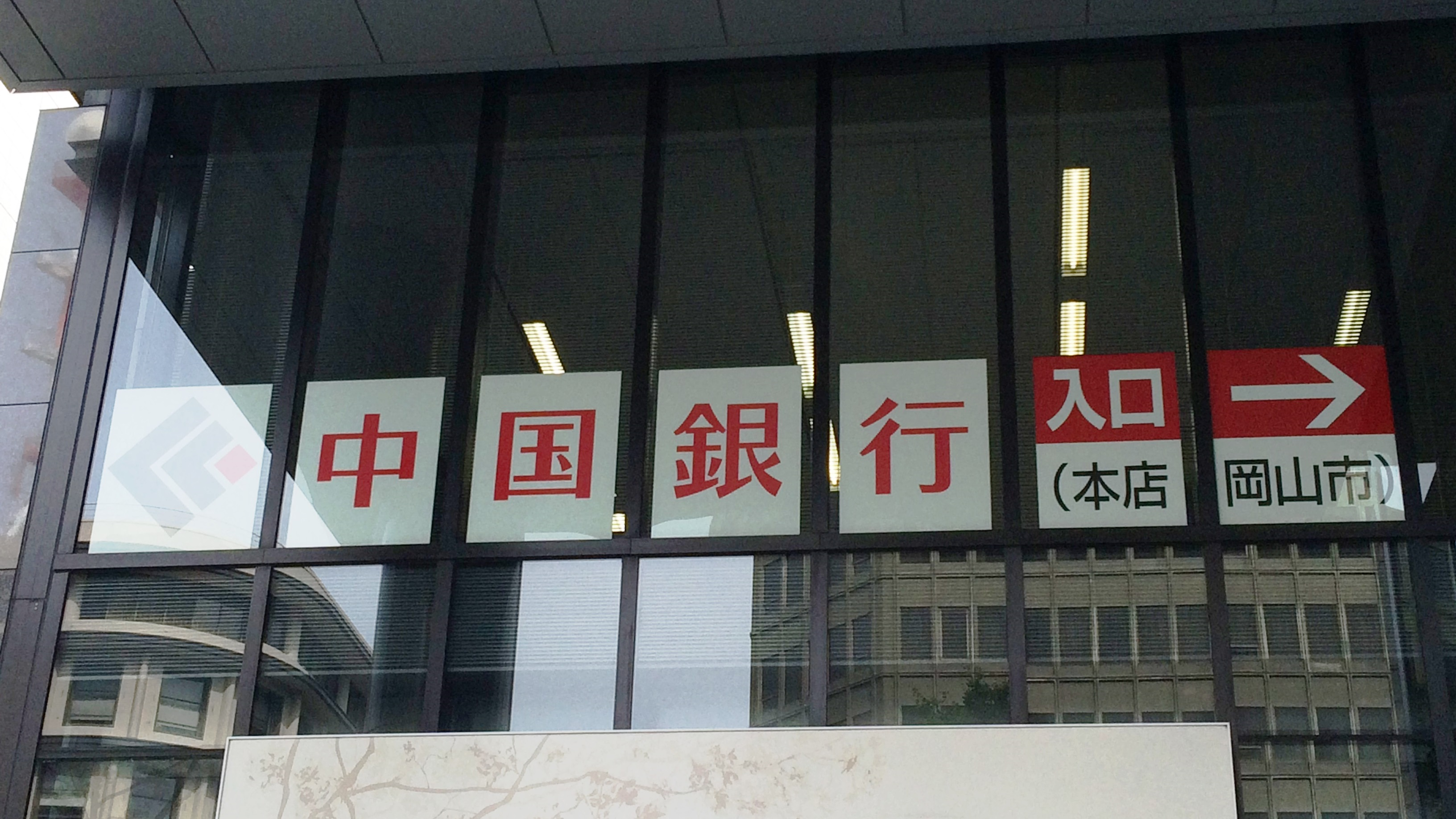 中国銀行の看板に「本店岡山市」が併記された例。大阪府大阪市中央区平野町三丁目6番1号 あいおいニッセイ同和損保御堂筋ビル2階にある大阪支店。